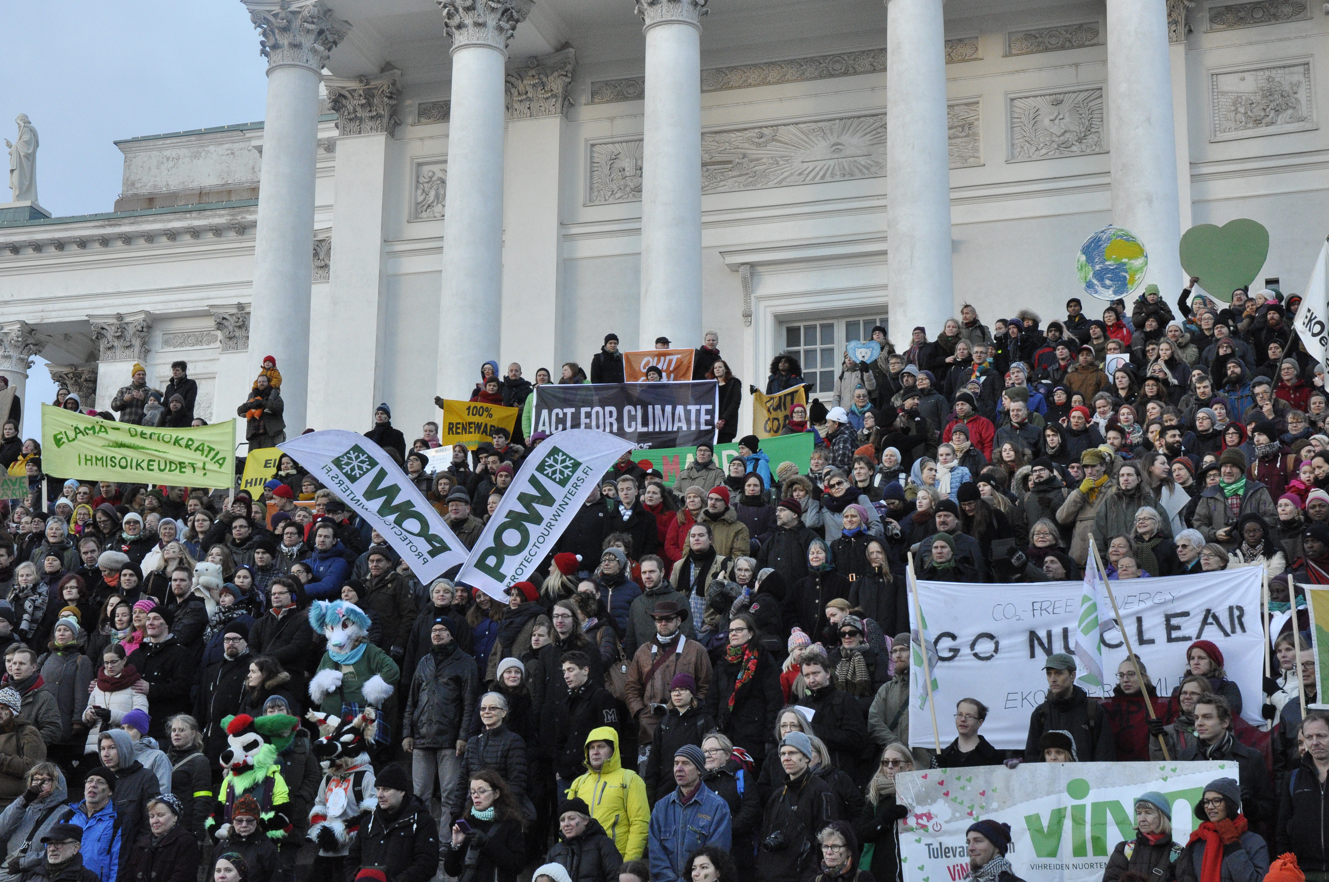 2015 Helsinki